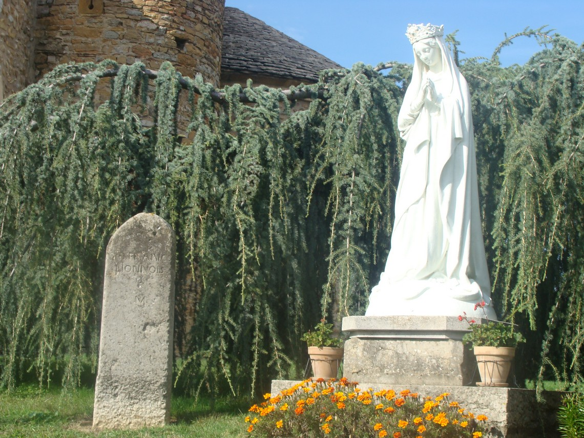 Montanay (Rhône): près d'une statue moderne de la Vierge, une ancienne borne délimitant le territoire du Franc-Lyonnais.